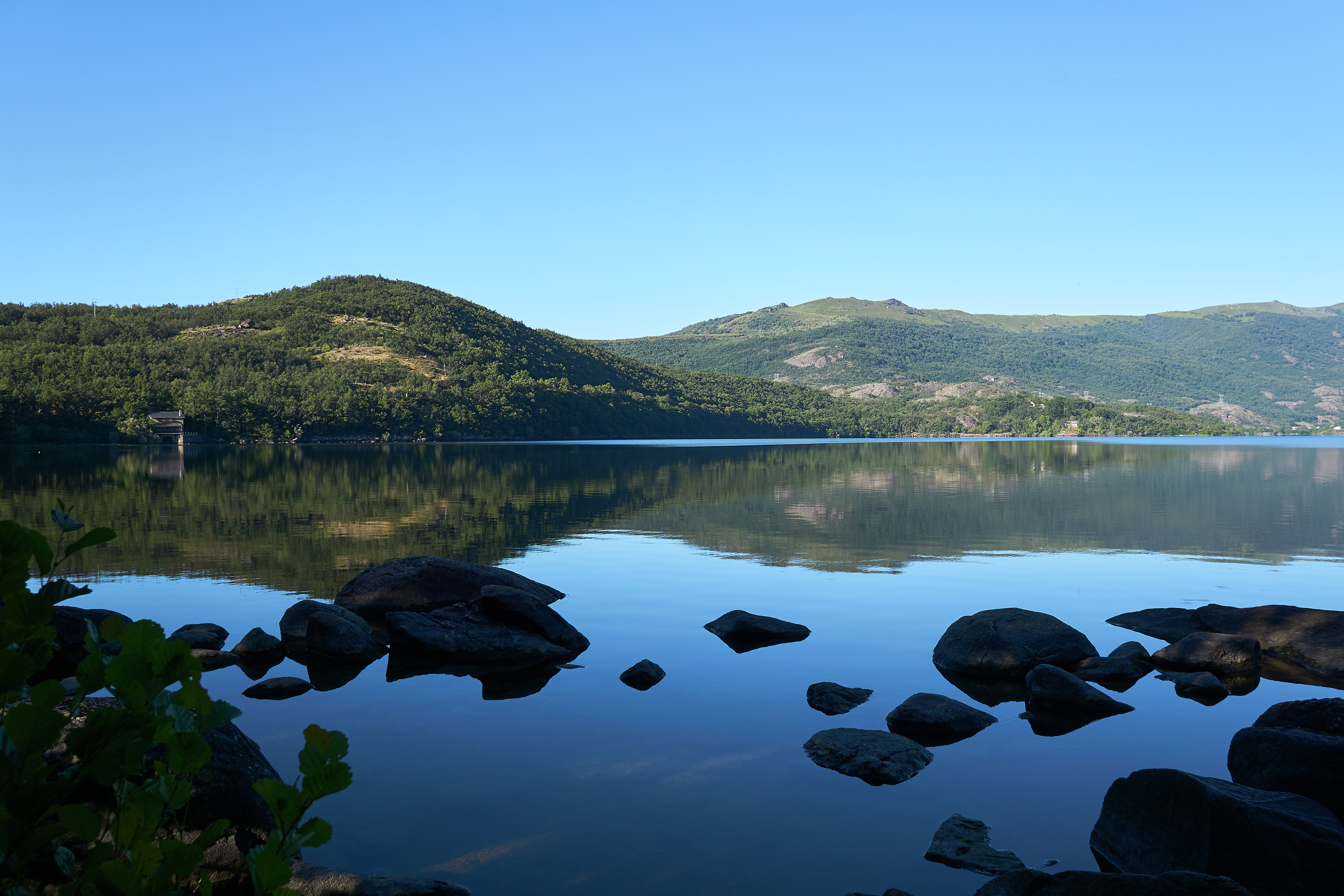 Lago de Sanabria y alrededores. Lago de Sanabria una mañana de verano. This is a photography of a Special Area of Conservation in Spain with the ID: ES4190105. Natura2000 entry, EEA entry